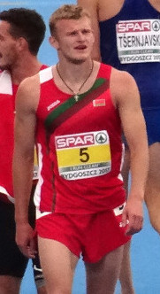 Młodzieżowe Mistrzostwa Europy w Lekkoatletyce U23 w Bydgoszczy 2017; dziesięciobój mężczyzn, bieg na 1500 m finał